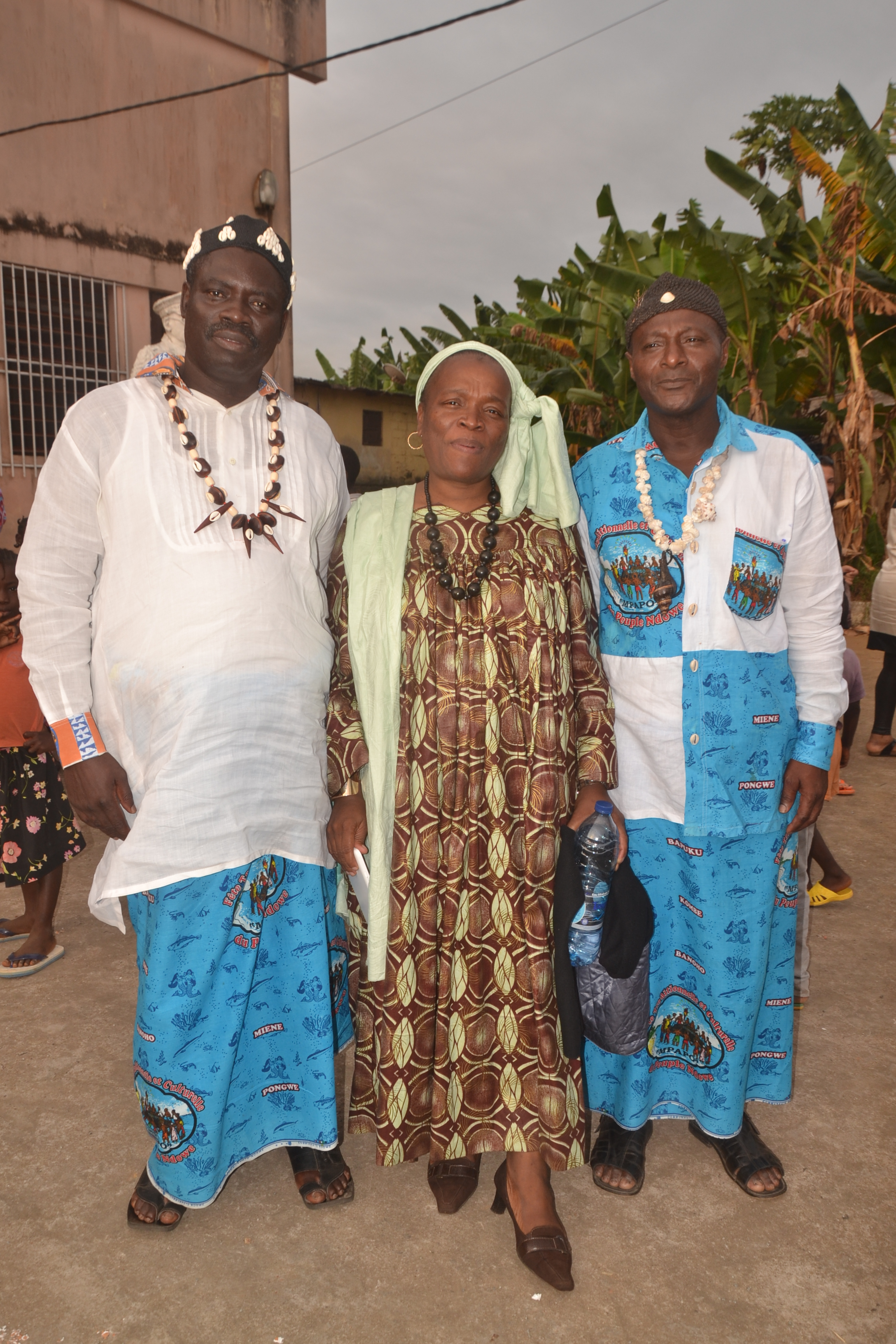 Autorités traditionnels chez les Batanga Ndowe du Cameroun This is an image of Cultural Fashion or Adornment from Cameroon